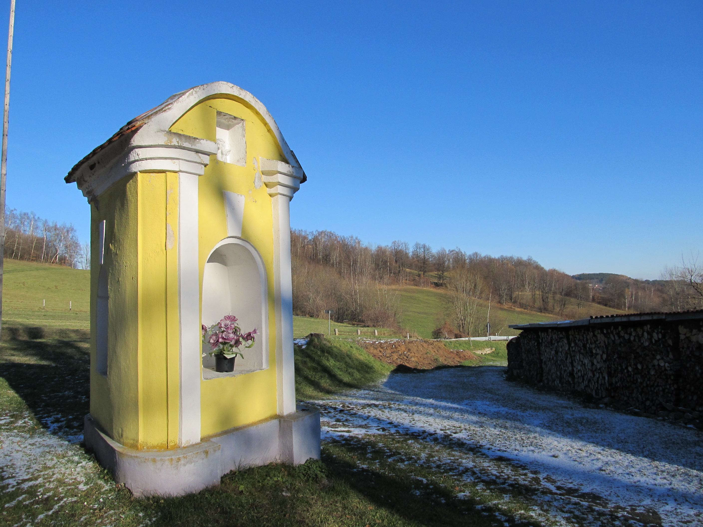 Radhostice - výklenková kaplička